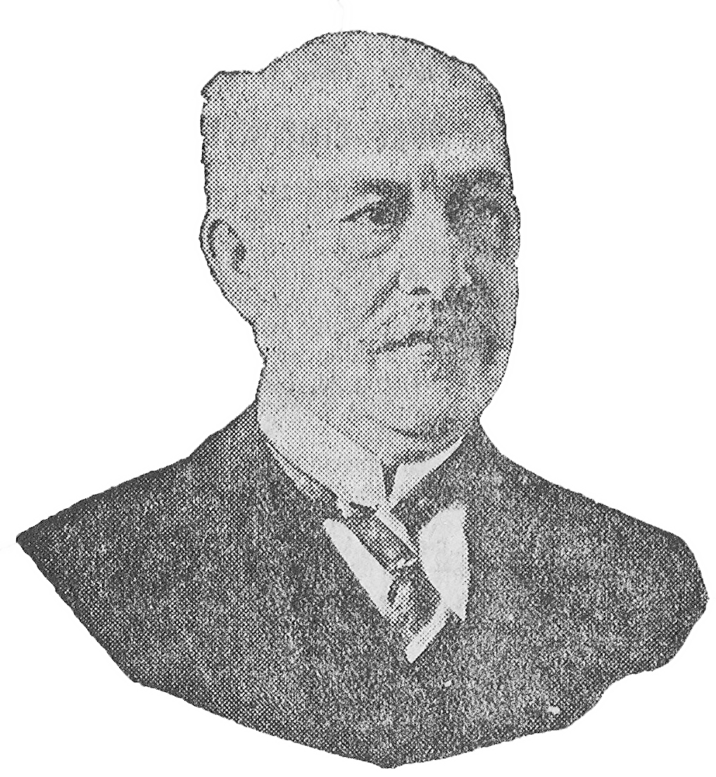 Ludwig Kößler (1861–1927); 1899–1927 Präsident der Urania (Wien)